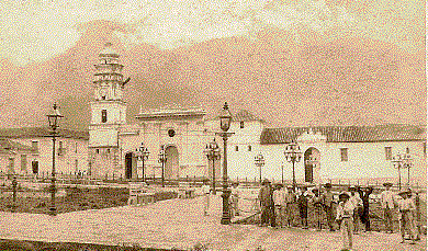 Mérida city (Venezuela) in 1899